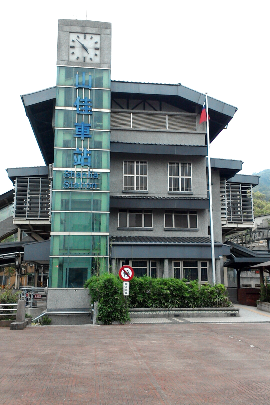 台鐵山佳車站新站房,新北市樹林區中山里